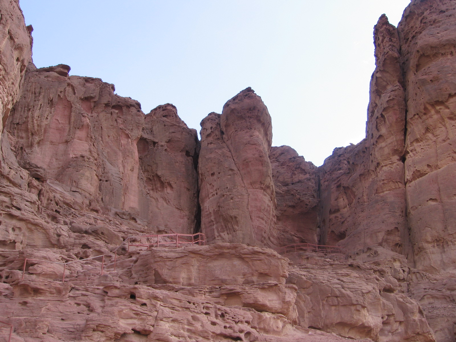 Timna Park, Negev, Israel